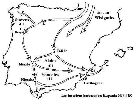 Carte des invasions des barbares en Hispanie(409-415) Travail personnel Catégorie:Grandes invasions